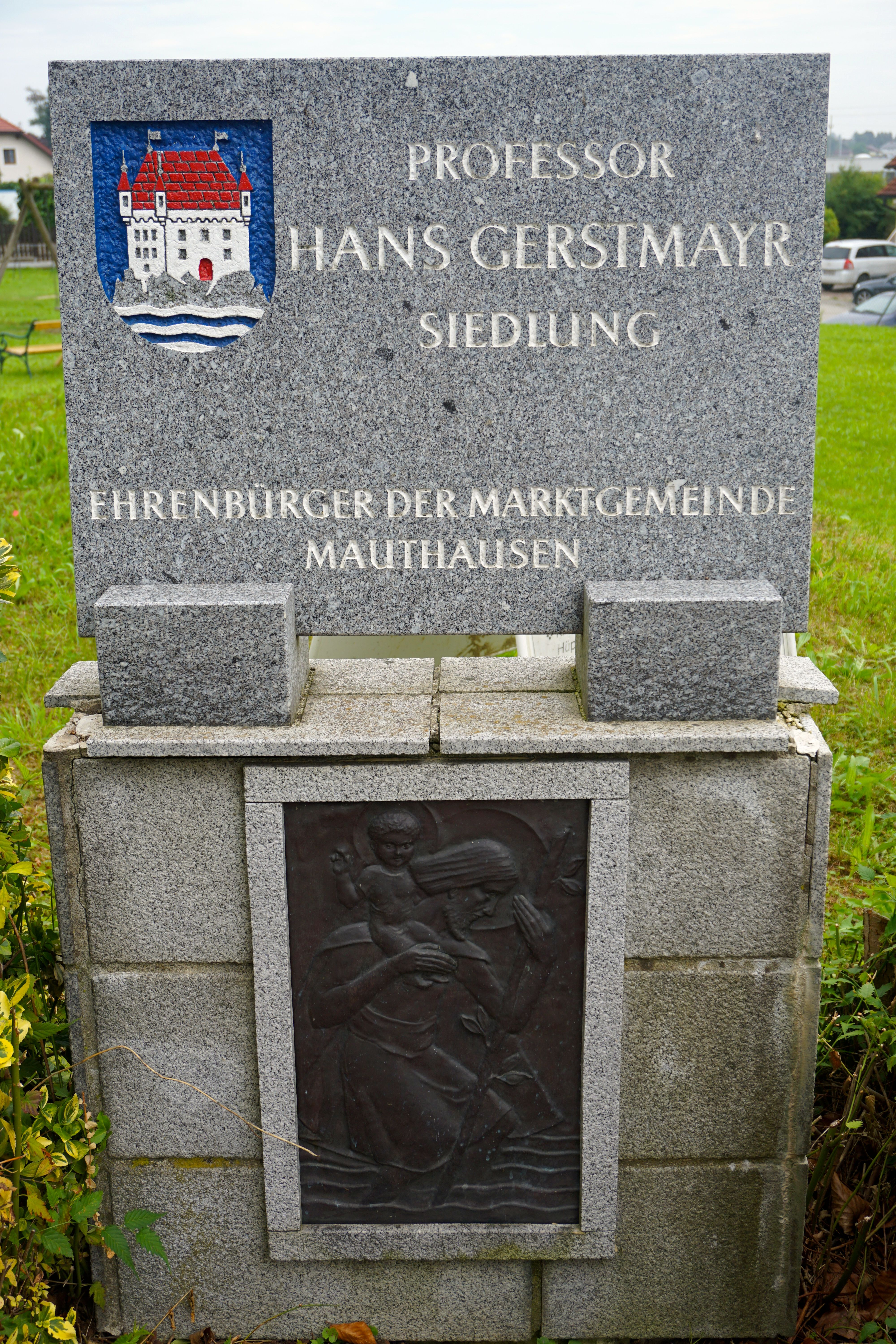 Hans Gerstmayr Gedenkstein an der Kreuzung von Gerstmayrstraße und Gerstmayrweg in der Gerstmayrsiedlung in Mauthausen.